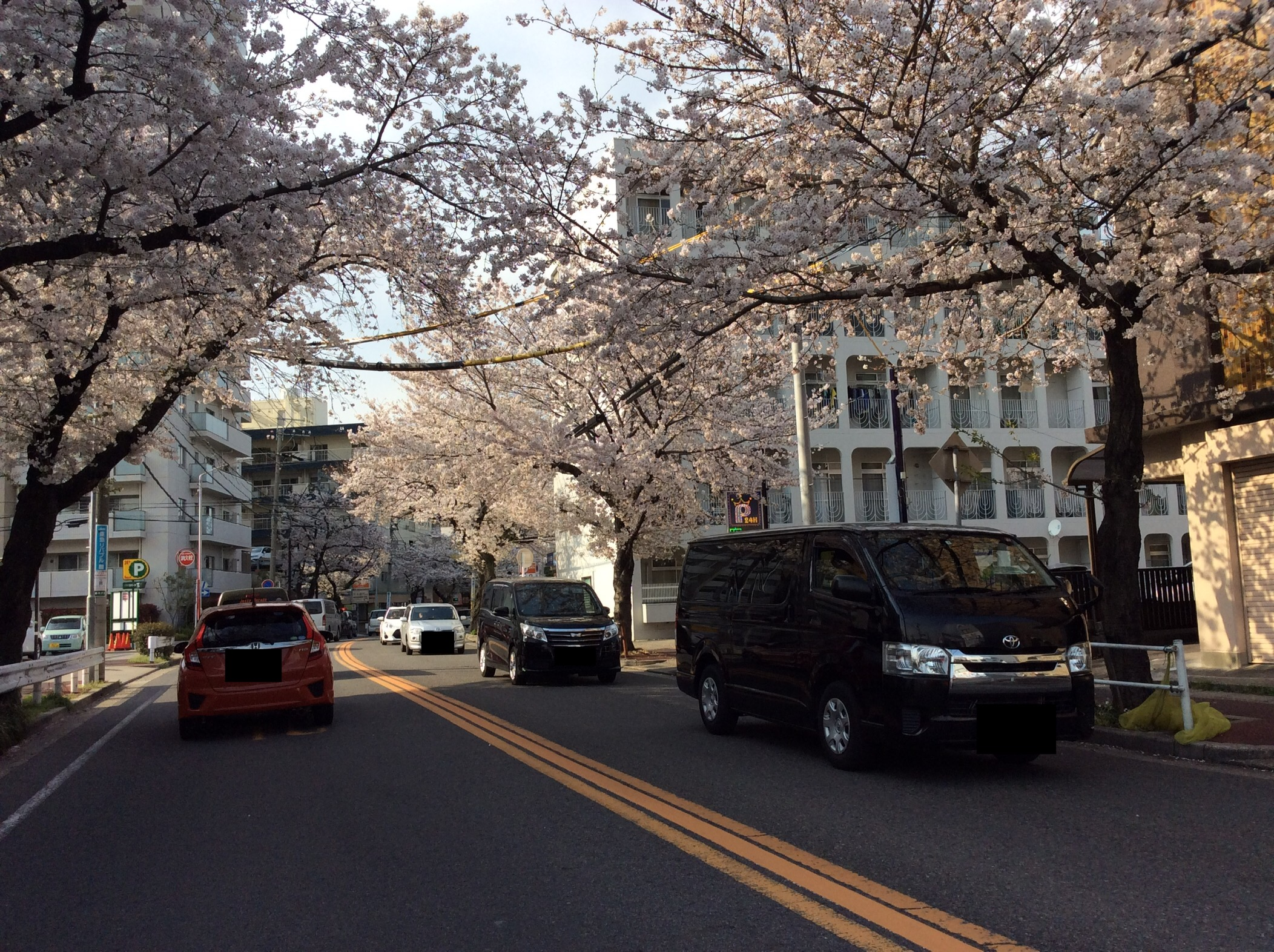 「桜満開の坂道」（名古屋市名東区）の、藤が丘駅東交差点すぐ南側